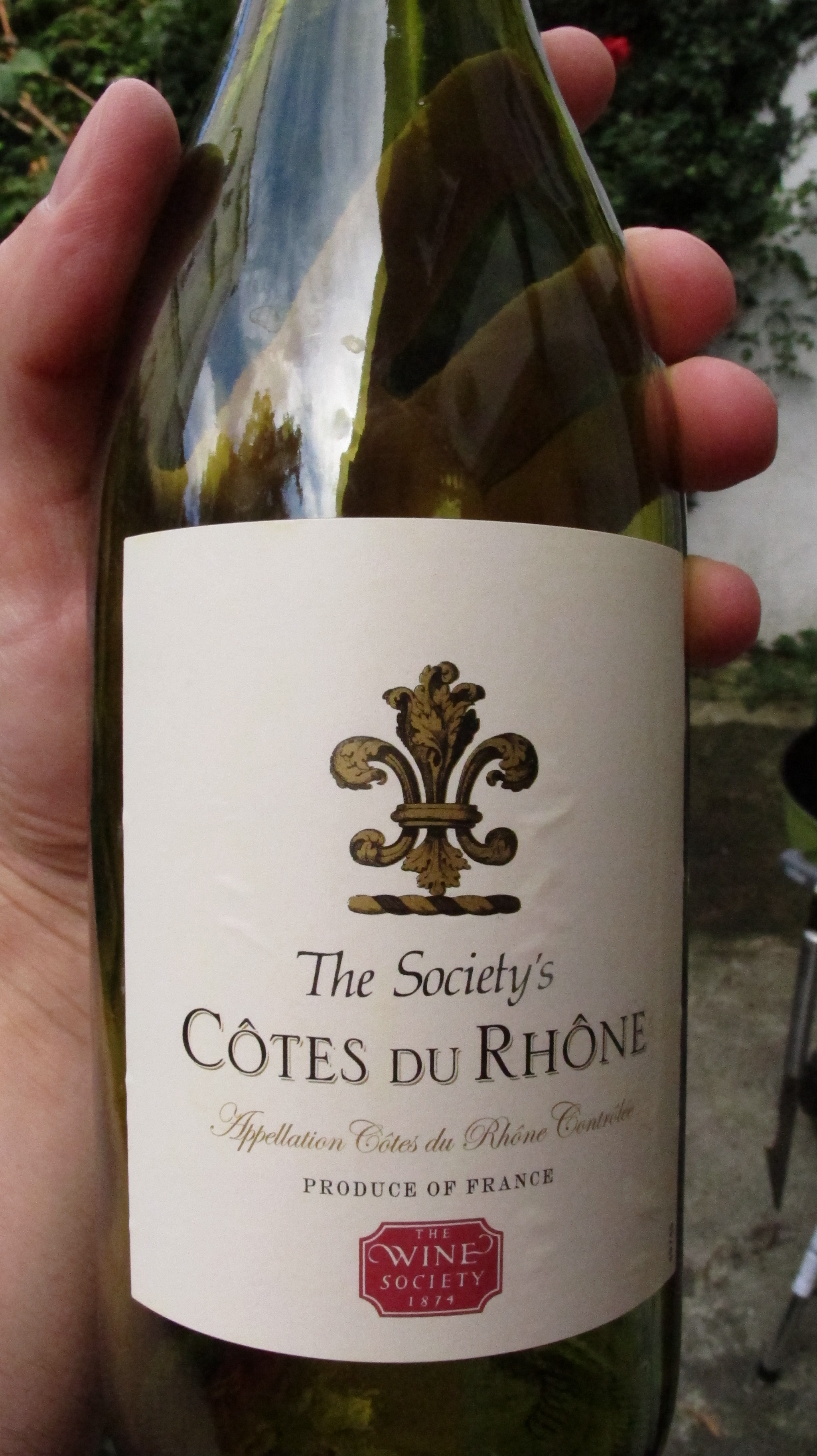 The Society's Cotes du Rhone bouteille commercialisée en Grande Bretagne